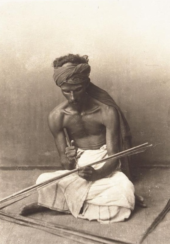 എഴുത്താണി ഉപയോഗിച്ച് താളിയോലയിൽ എഴുതുന്നു